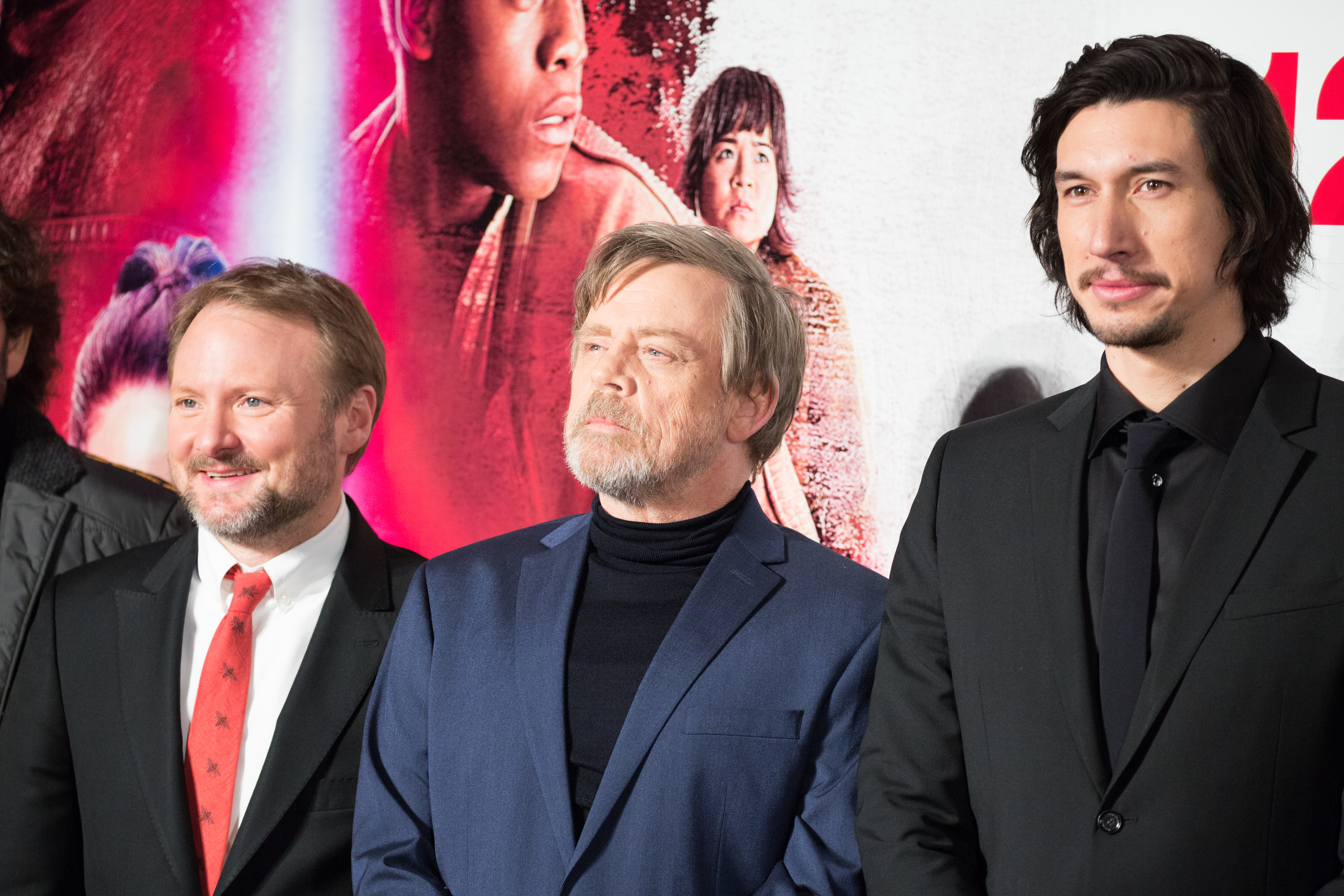 スター・ウォーズ/最後のジェダイ ジャパン・プレミア レッドカーペット ライアン・ジョンソン マーク・ハミル アダム・ドライバー